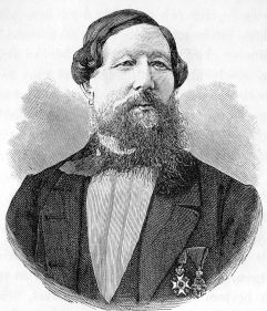 Elling Carlsen (1819-1900), norwegischer Walfänger und Entdecker.